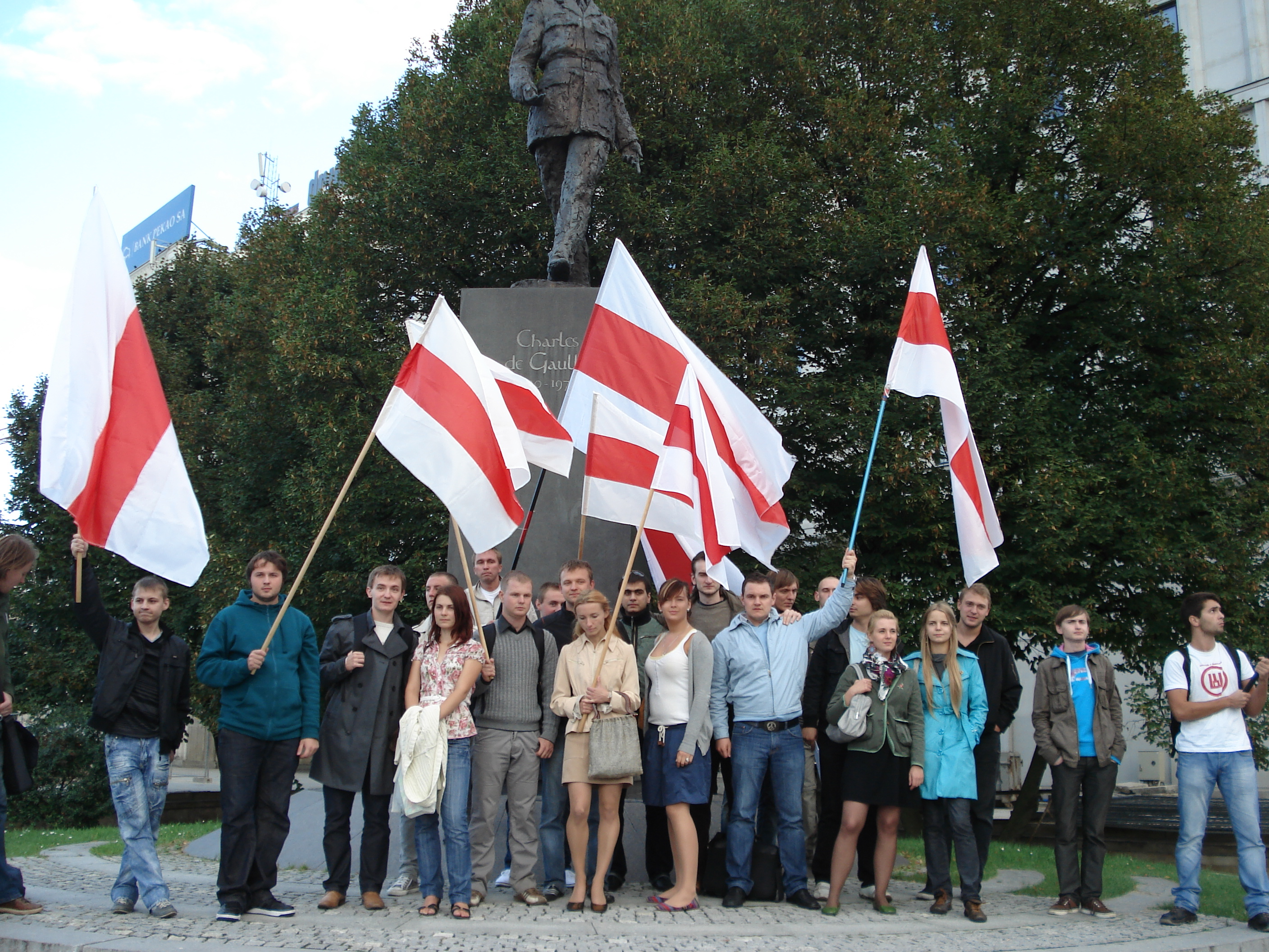 Dzień Białoruskiej Chwały Wojskowej w Warszawie.